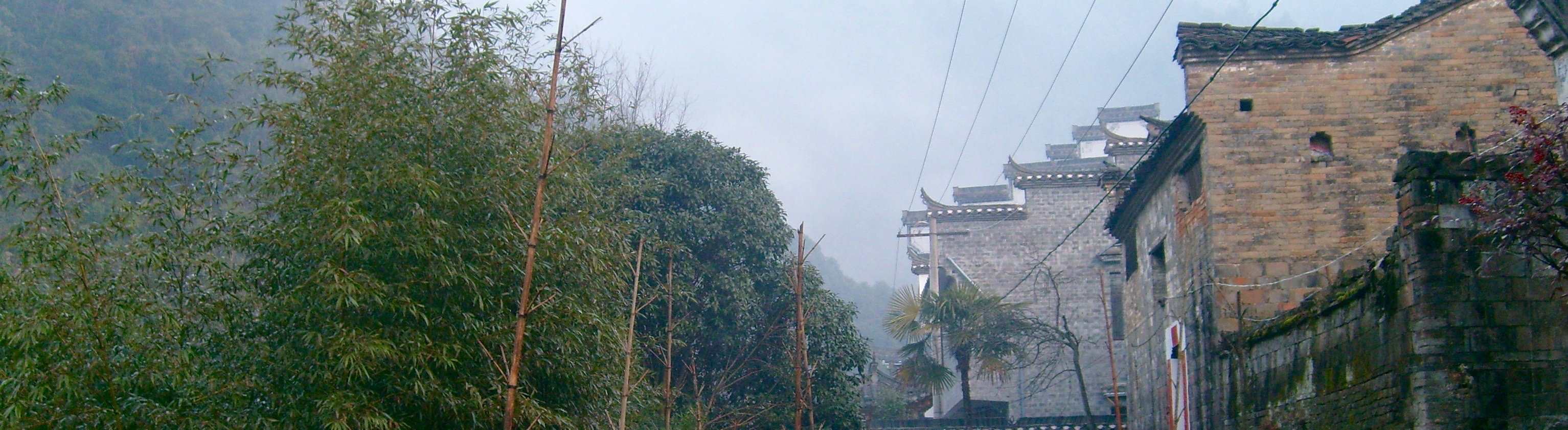 瑶里徽派建筑一瞥